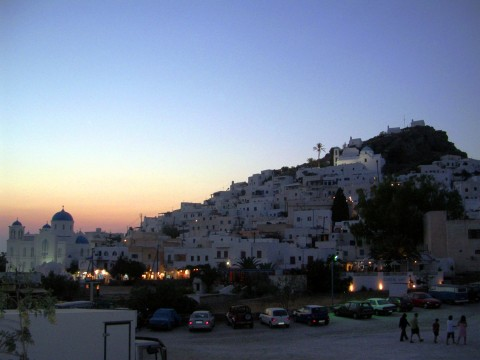 Khora.